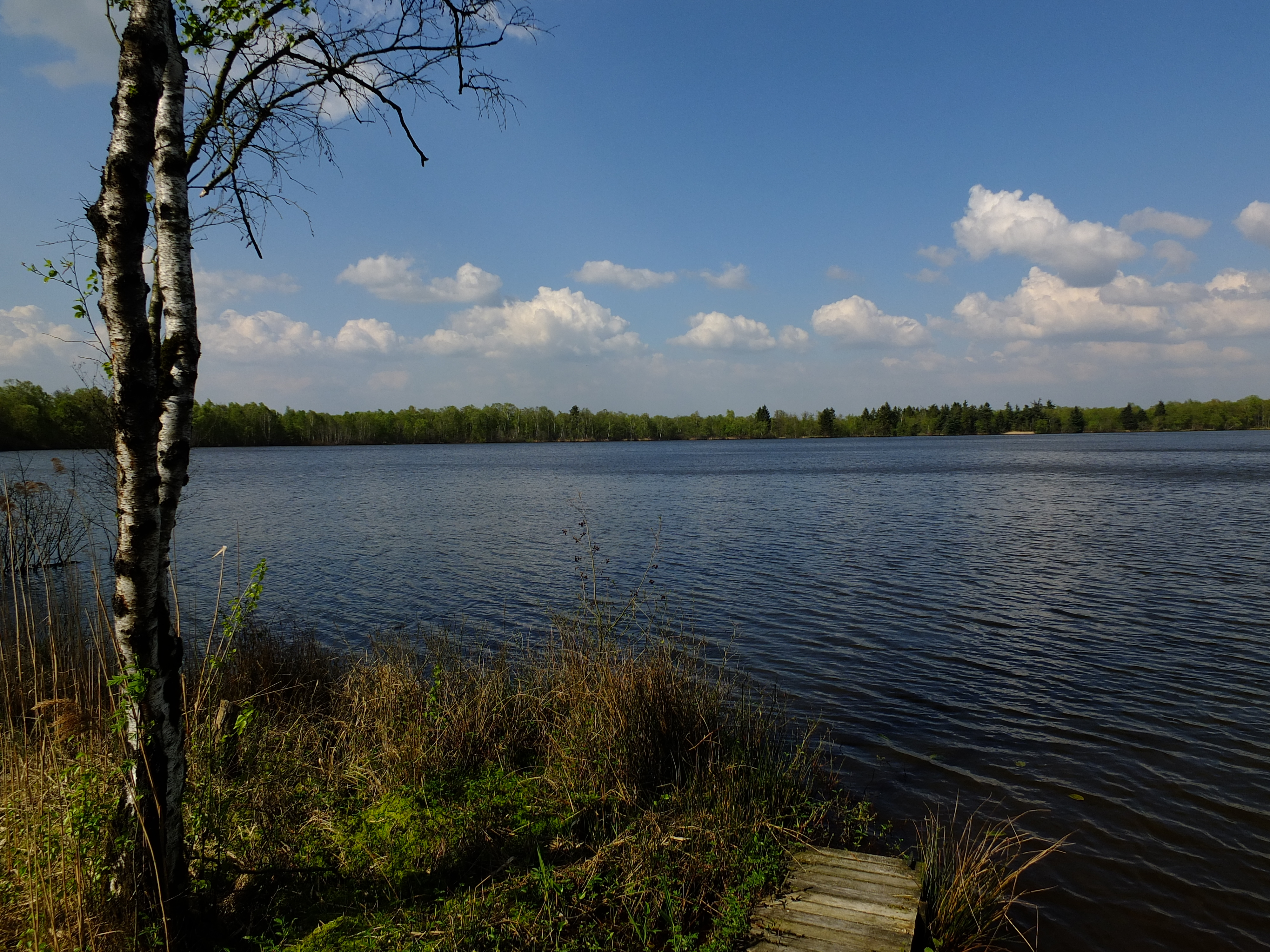 Sager Meer - NSG WE 252